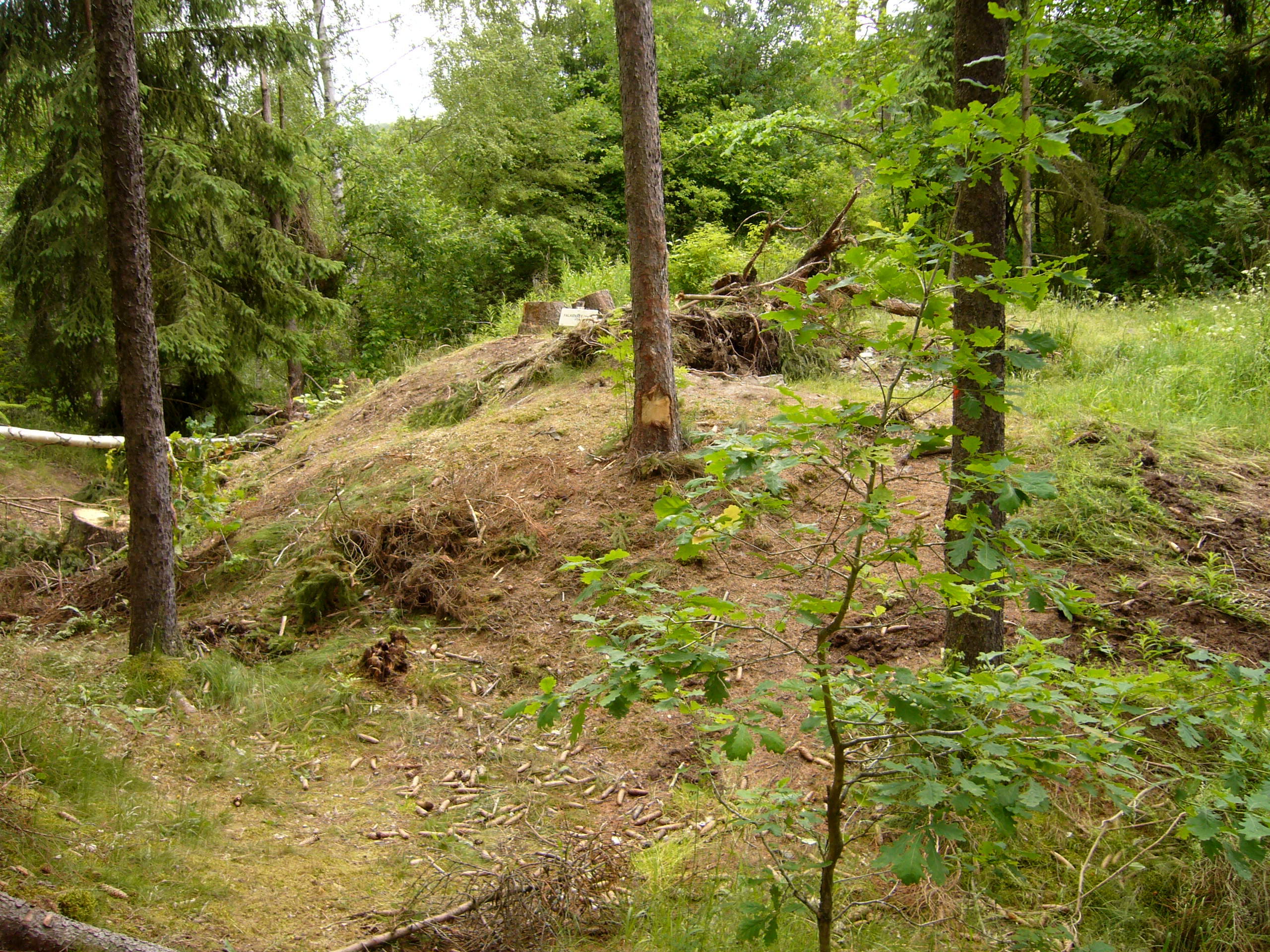 Hrad Falkenstein u Potína - hradní jádro